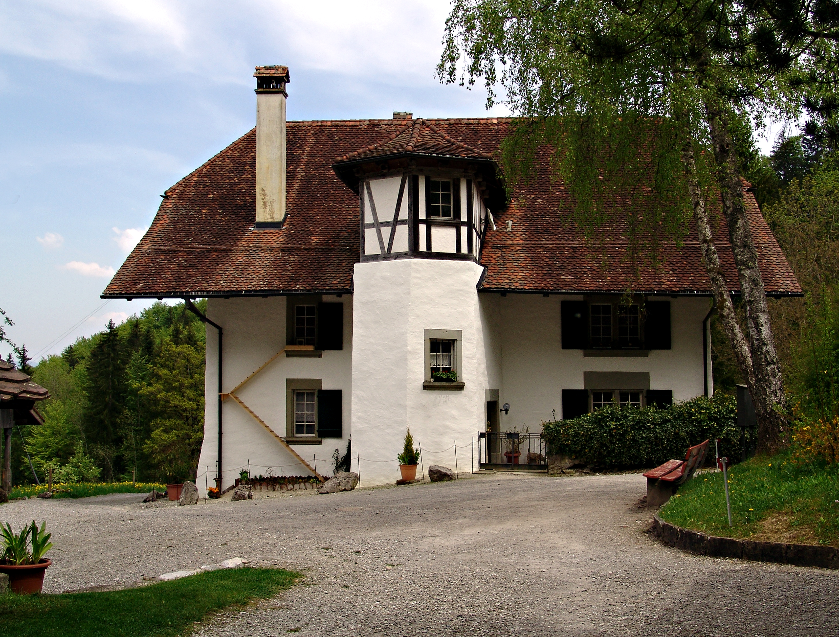 Reformierte Kirche Blumenstein BE, Nebengebäude